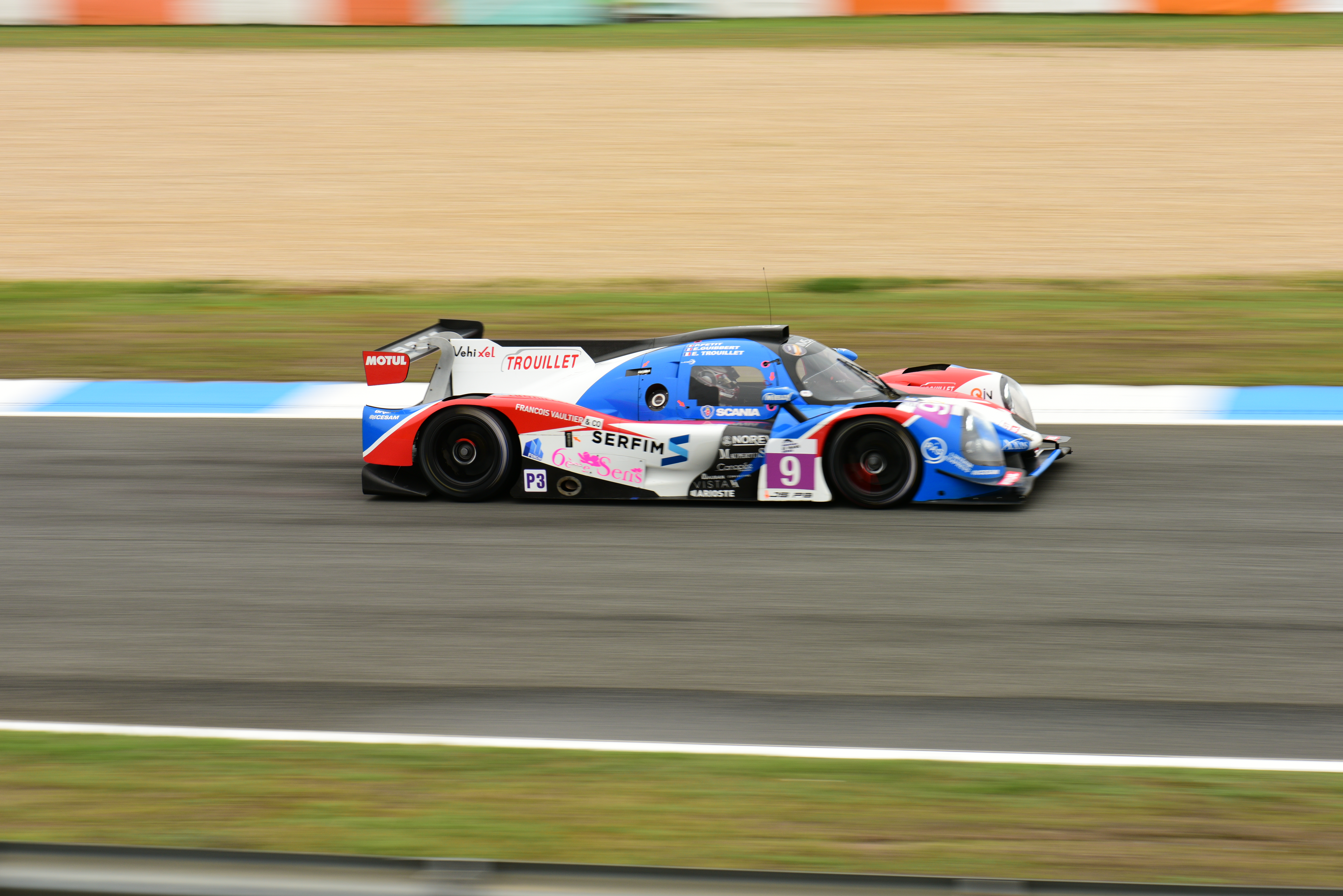 ELMS - 2016 - 4 Horas Estoril - Portugal